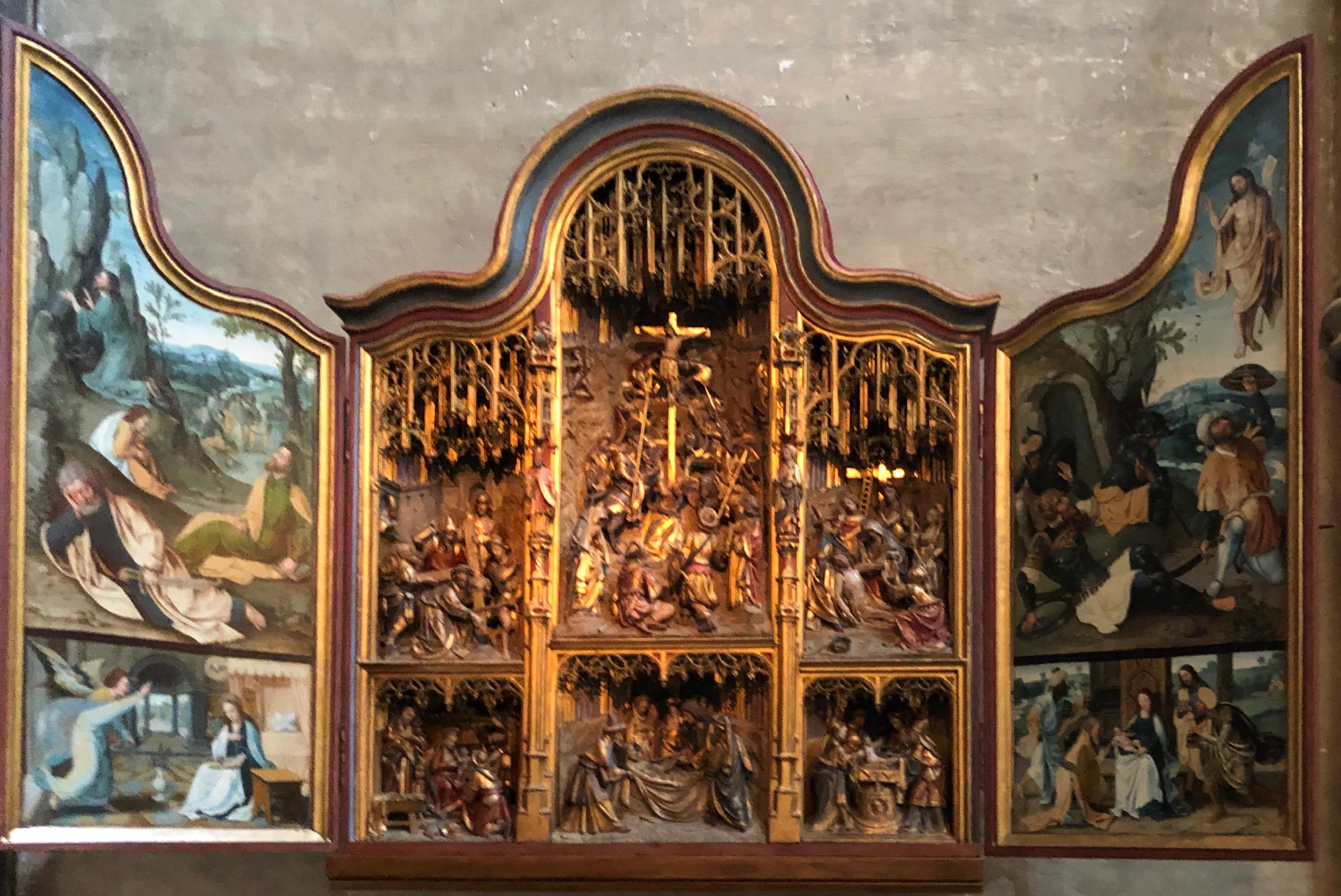 Antwerpener Schnitzaltar in der Münsterkirche in Roermond, Niederlande